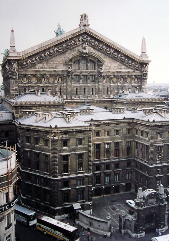 Opera, Paris